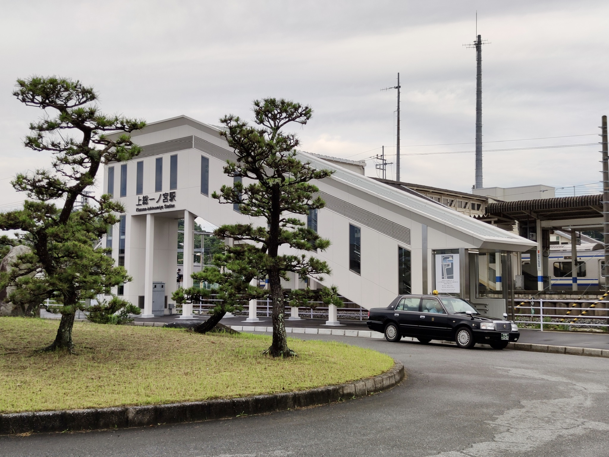 上総一ノ宮駅東口